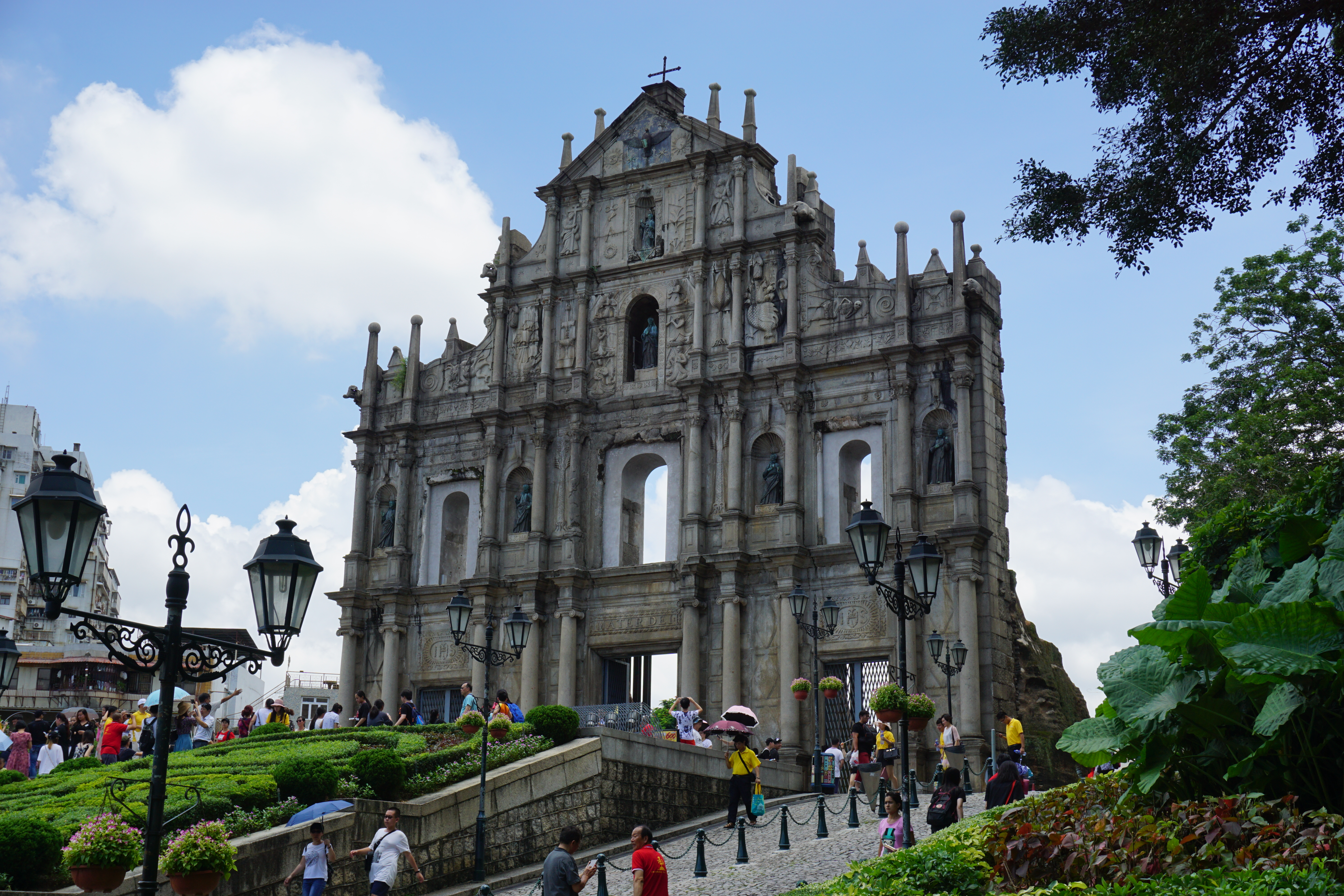 中文（中国大陆）: 拍摄于2017/7/21